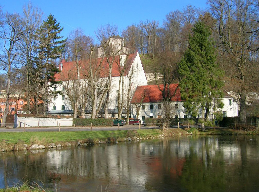 Gebäude in der Mitte mit Treppengiebel ist Teil der Brauerei. Darüber das Hochschloß.